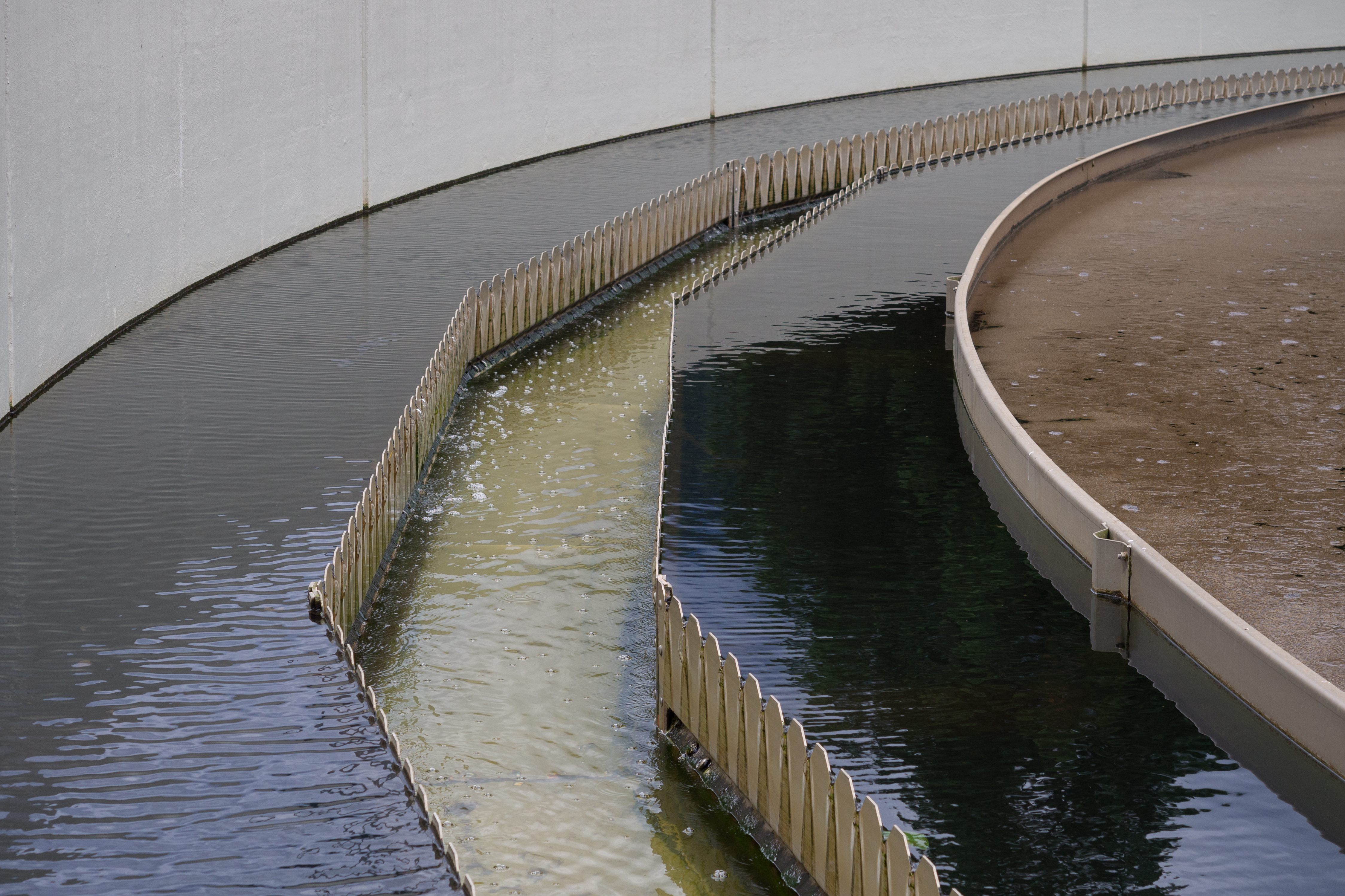 Abtrennung des geklärten Wassers vom Klärschlamm am Rande eines der Nachklärbecken in der Kläranlage Fritzens des Abwasserverbands Hall-Fritzens